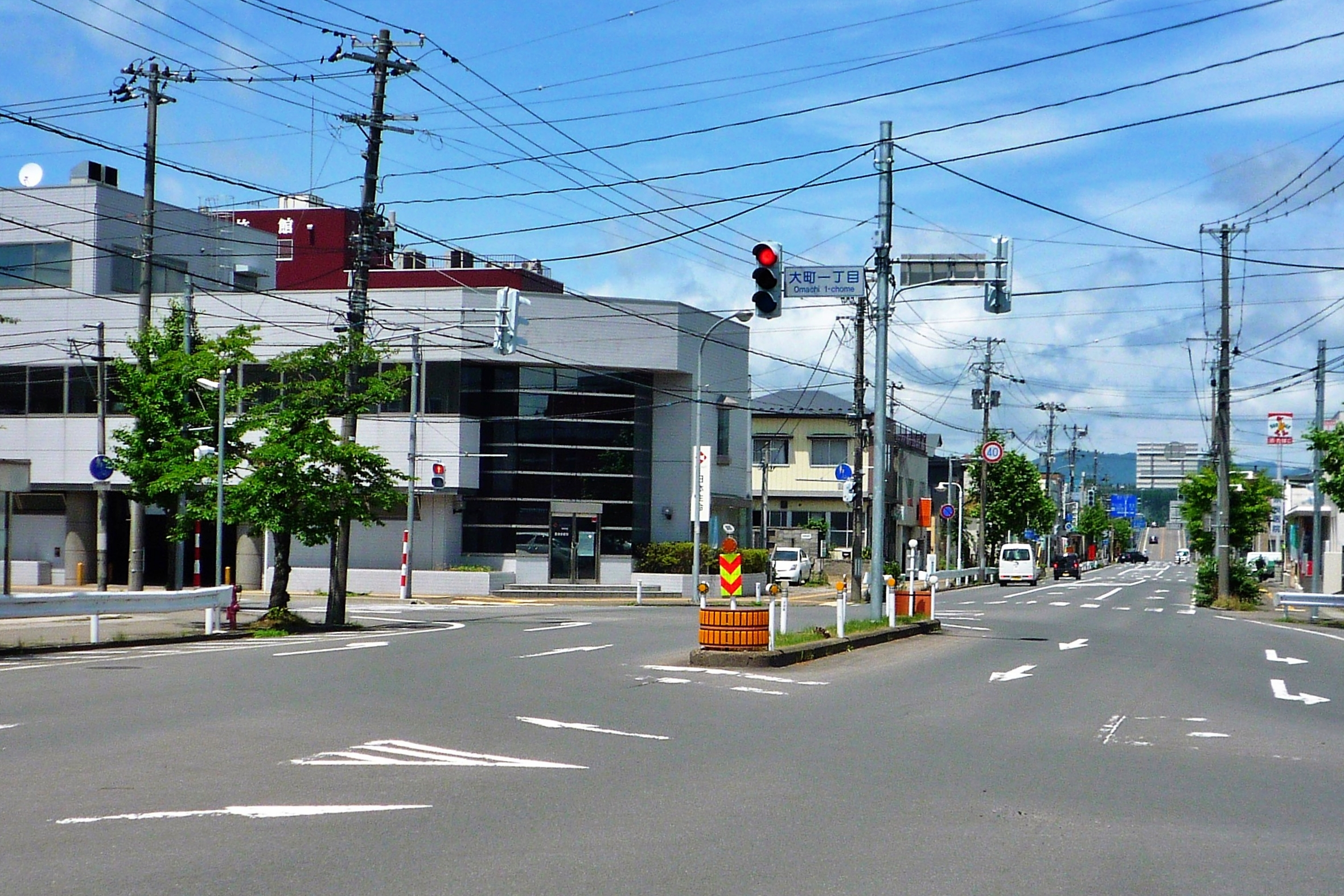 秋田県道24号鷹巣川井堂川線 大町1丁目交差点 （鷹巣陸橋方向）